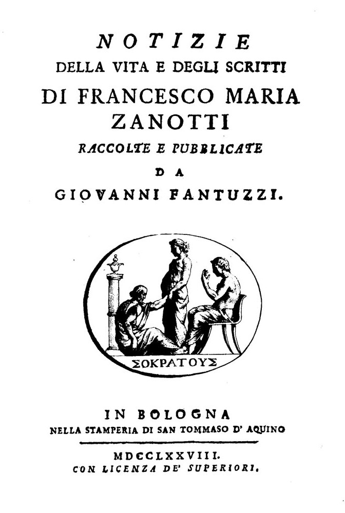 Notizie della vita e degli scritti di Francesco Maria Zanotti raccolte e pubblicate da Giovanni Fantuzzi. - In Bologna : nella Stamperia di San Tommaso d'Aquino, 1778. - 64 p., [1] c. di tav. : antip. calcog. ; 8º .